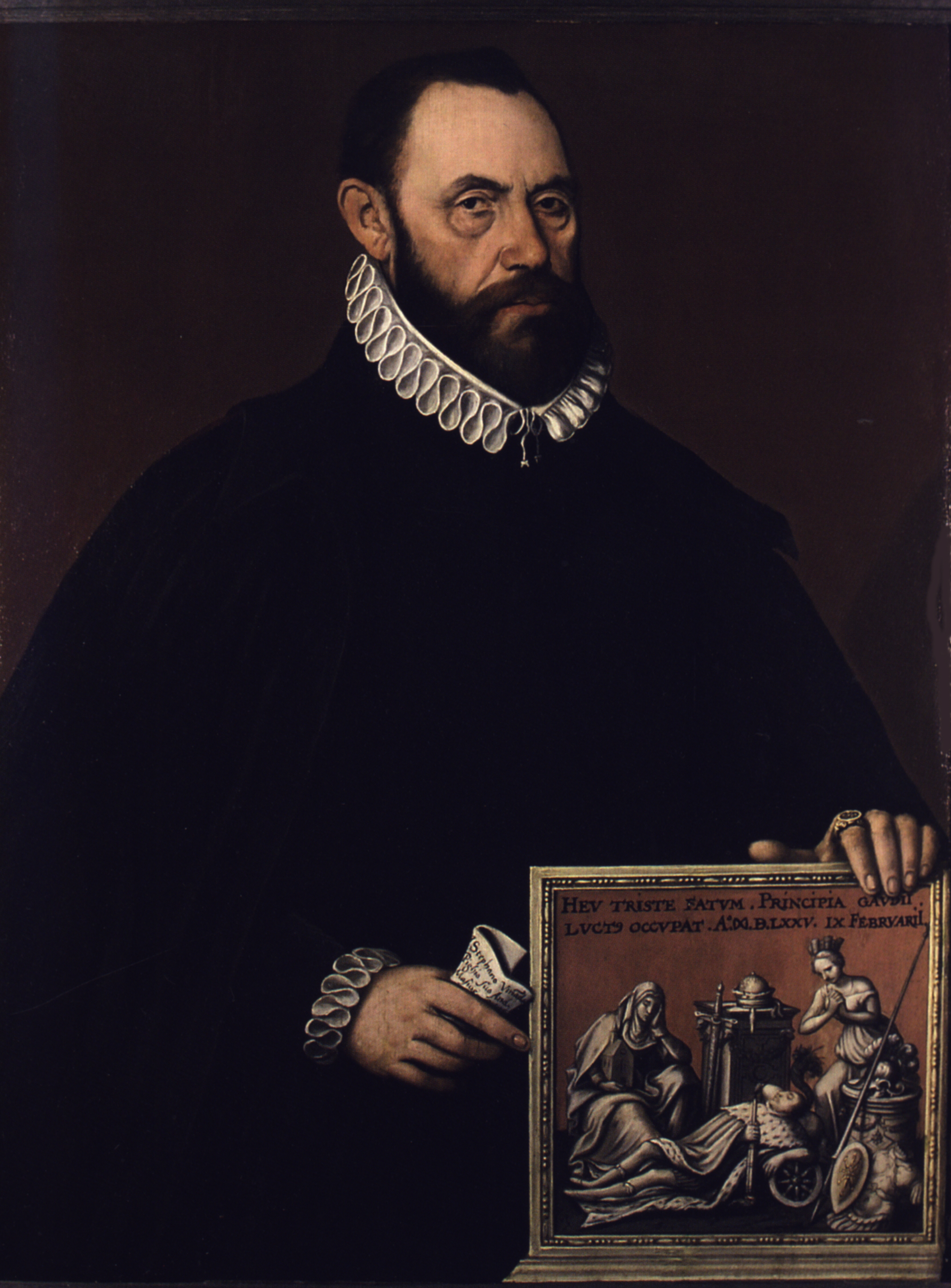 Stephanus Winandus Pighius (1520–1604); Gemälde eines unbekannten Künstlers; Historisches Museum, Deventer